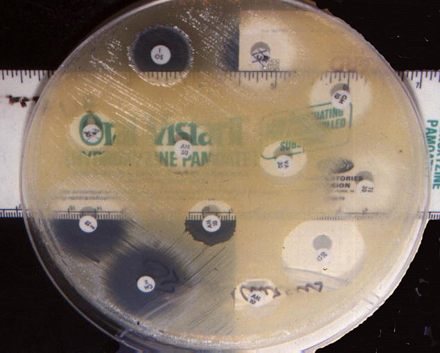 Mueller Hinton con aloni di inibizione. Antibiogramma